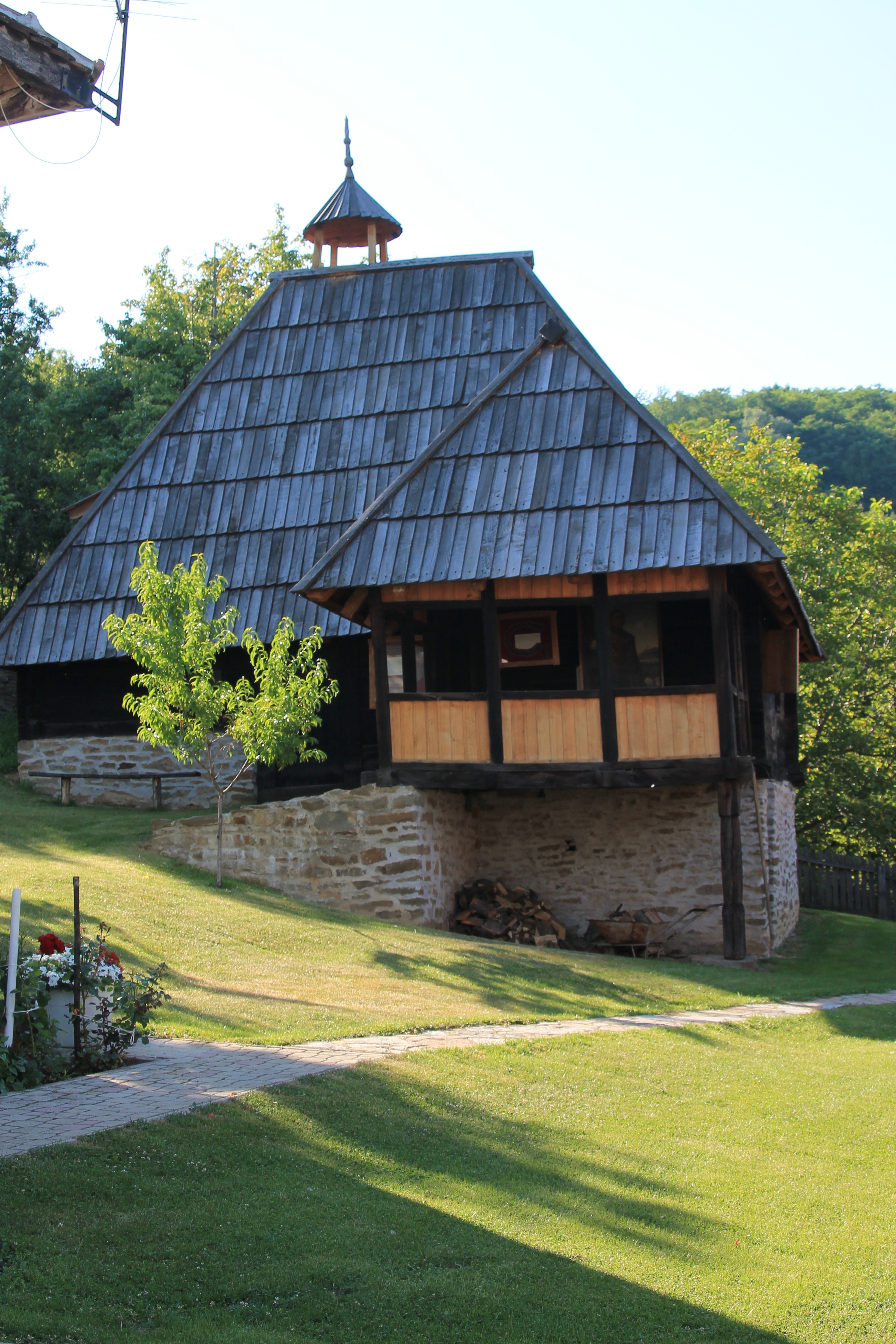 Milošev konak u Gornjoj Crnući